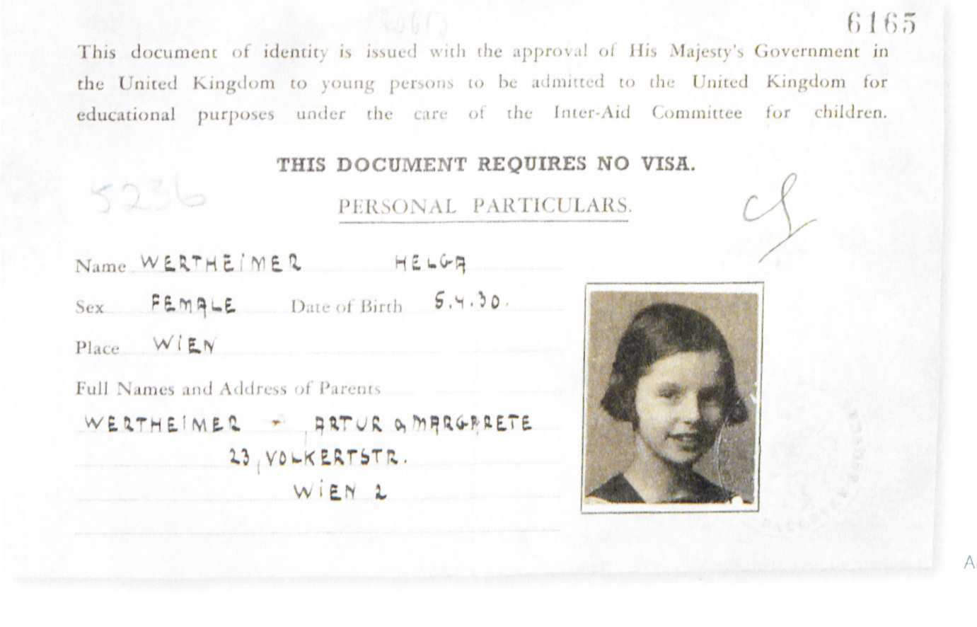 Kindertransporte Helga Wertheimer Bellenger 1939